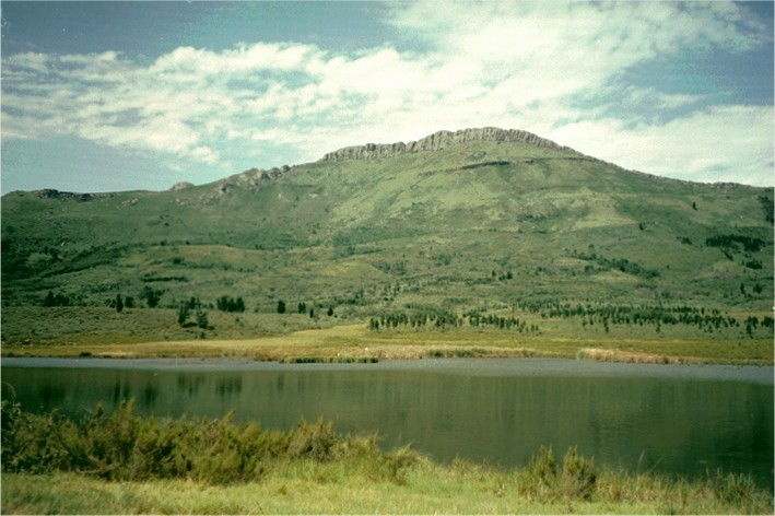 hogsback Oostkaap ZA berg Deze afbeelding is mijn eigen werk en ik stel haar onder GNU/FDL ter beschikking Jcwf